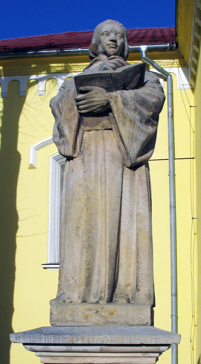 Pieskovcový pomník Júliusa Tranovského v Liptovskom Mikuláši